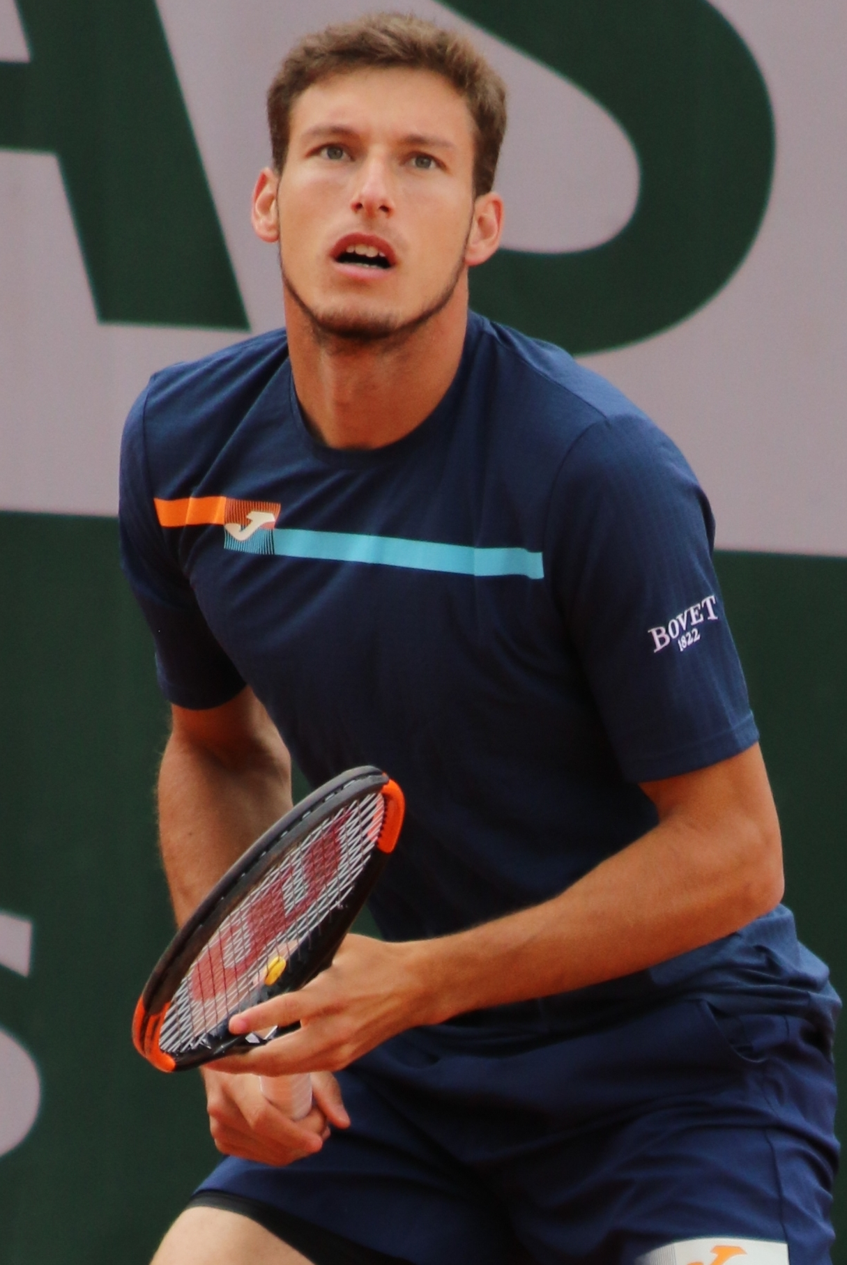 Carreno Busta RG19 (11)